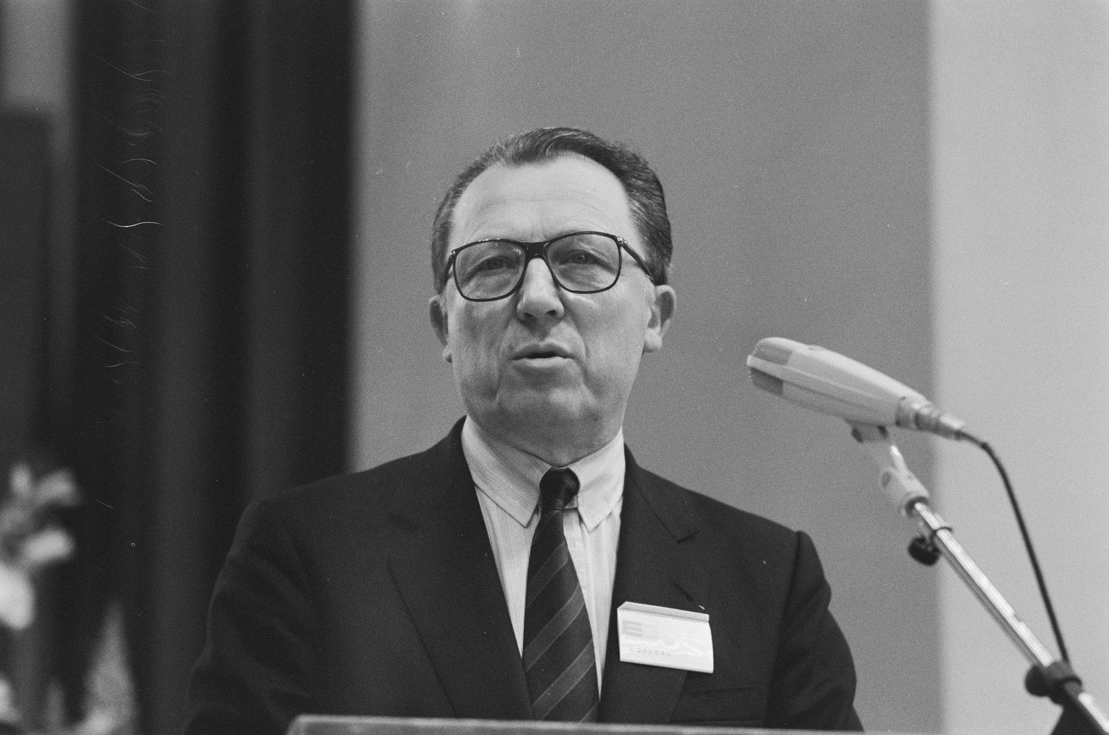 Collectie / Archief : Fotocollectie Anefo Reportage / Serie : [ onbekend ] Beschrijving : slotzitting Europa Congres ; Jacques Delors (voorzitter Europese Commissie ), close Datum : 7 mei 1988 Trefwoorden : congressen, voorzitters Persoonsnaam : Europese Commissie, Mitterrand, François Fotograaf : Croes, Rob C. / Anefo Auteursrechthebbende : Nationaal Archief Materiaalsoort : Negatief (zwart/wit) Nummer archiefinventaris : bekijk toegang 2.24.01.05 Bestanddeelnummer : 934-2445